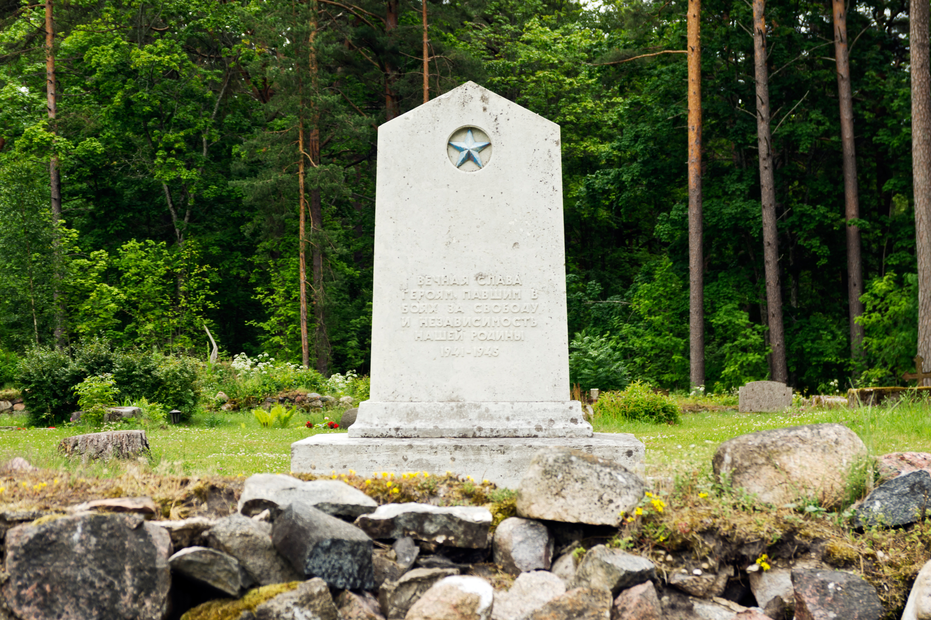 II maailmasõjas hukkunute mälestussammas Varbla kirikaias